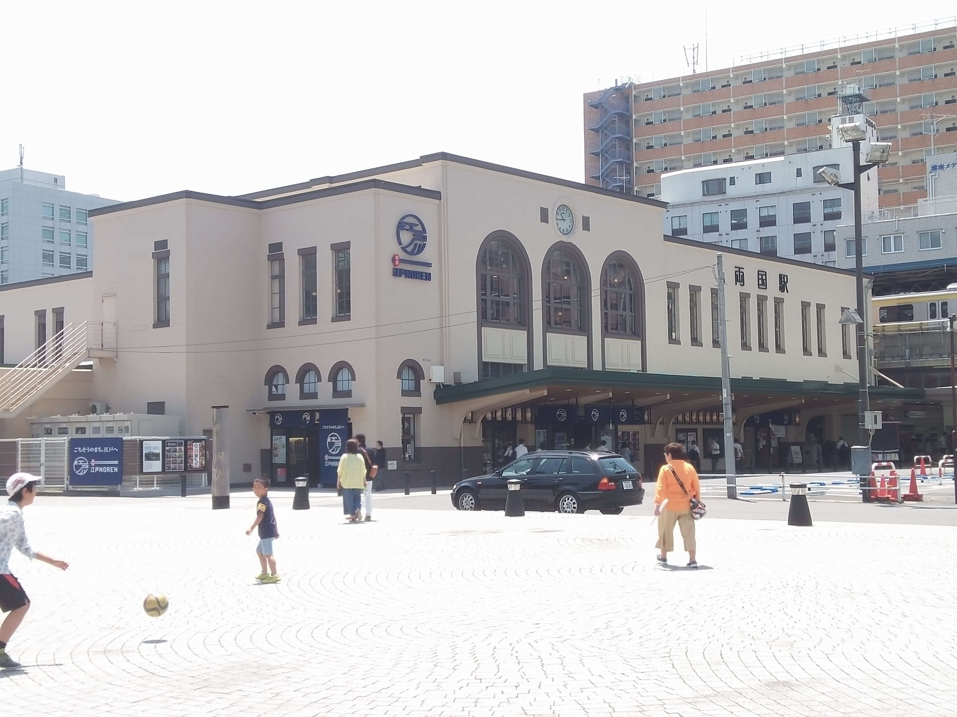 JR兩國站